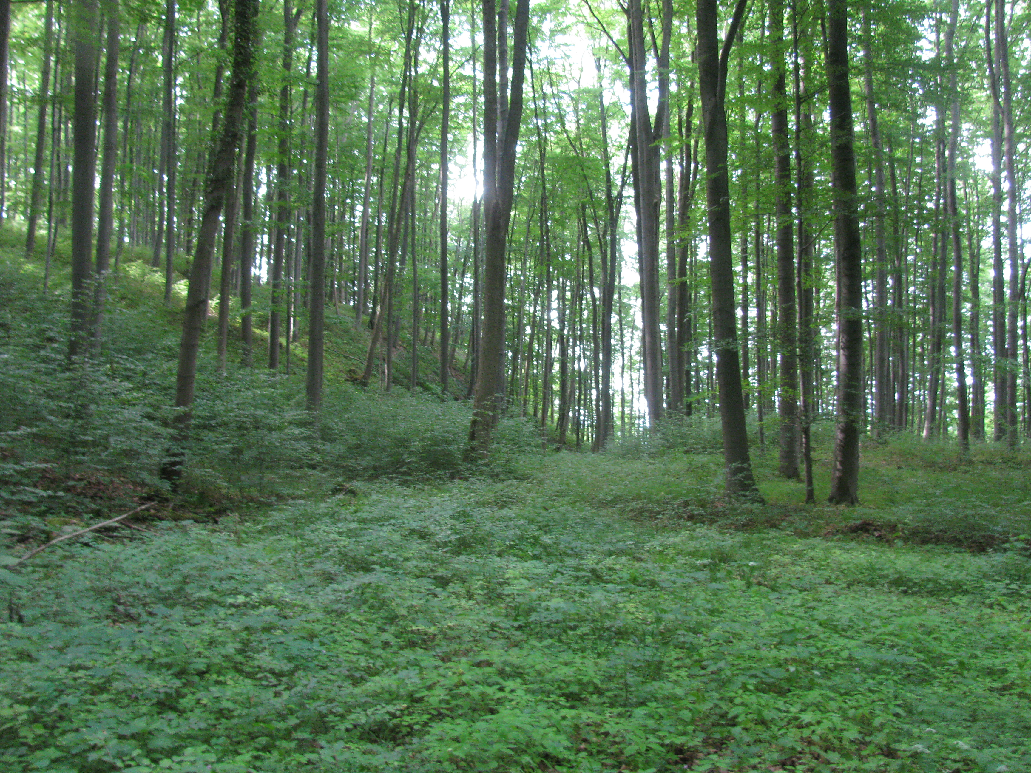 ein Teil des Bereichs Kalkberge bei Röhrda und Weißenborn, südöstlich von Weißenborn-Rambach, auf dem Kreutzerberg, FFH 4826-305